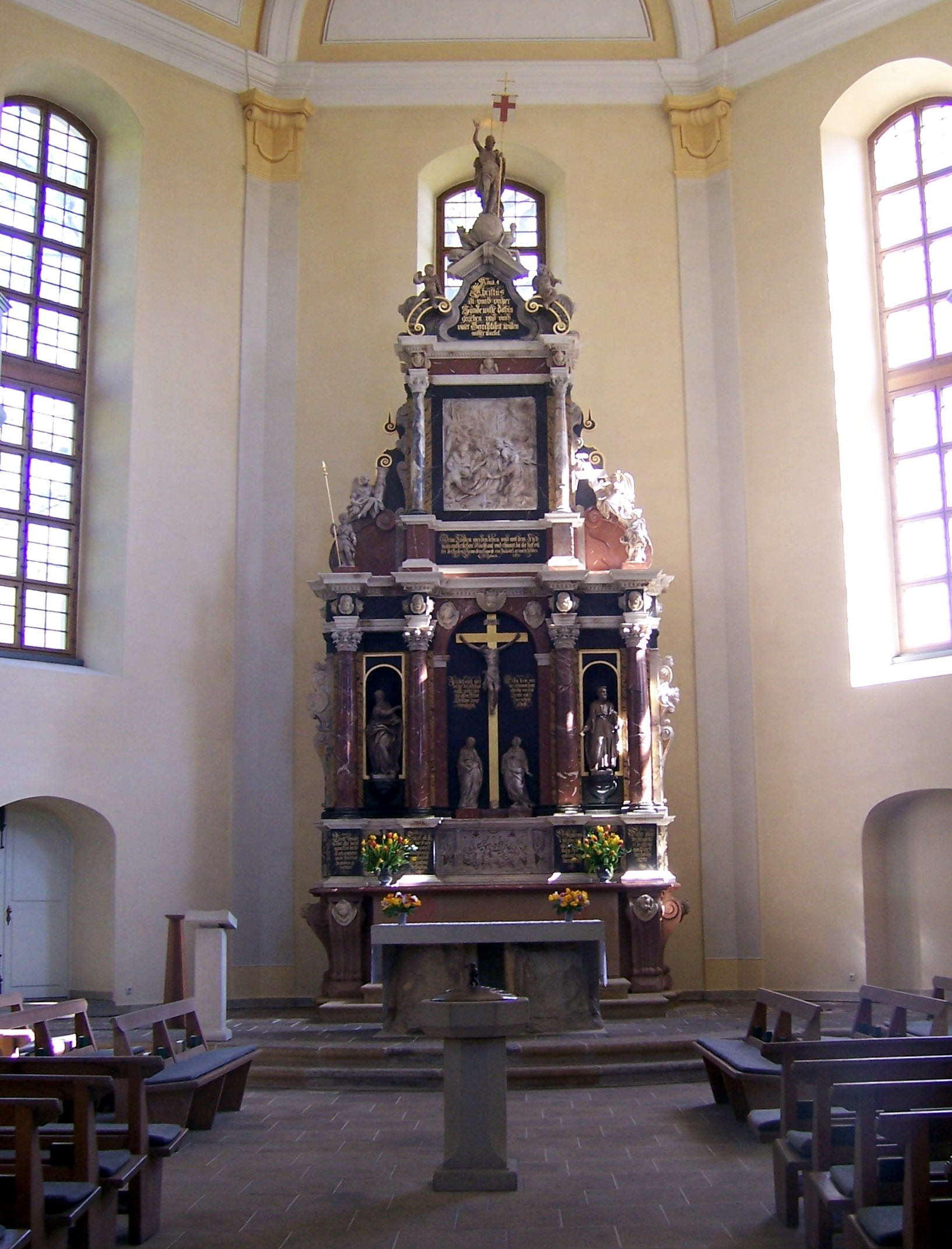 Der restaurierte Nosseni-Altar aus der zerstörten Sophienkirche, 2002 in der wiederaufgebauten Loschwitzer Kirche geweiht.